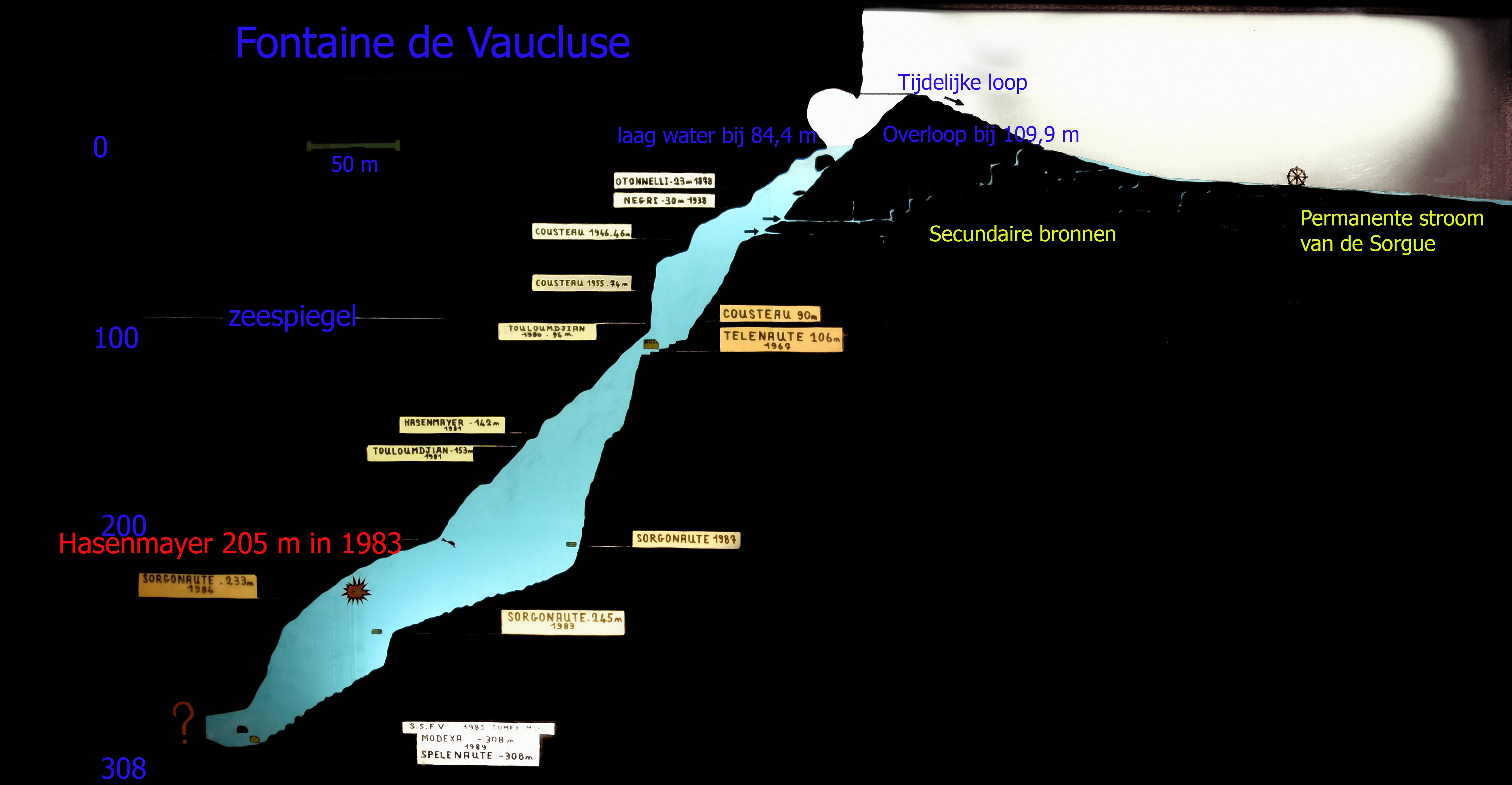 Kaart van Monde Souterrain de Norbert Casteret - Fontaine-de-Vaucluse 27-05-2018 14-42-29